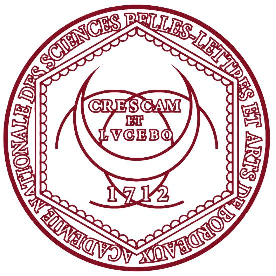 Sceau (1712) de l'Académie royale des sciences, belles-letrre et arts de Bordeaux